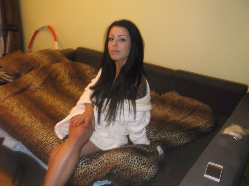 Dziewczyna siedząca na kanapie